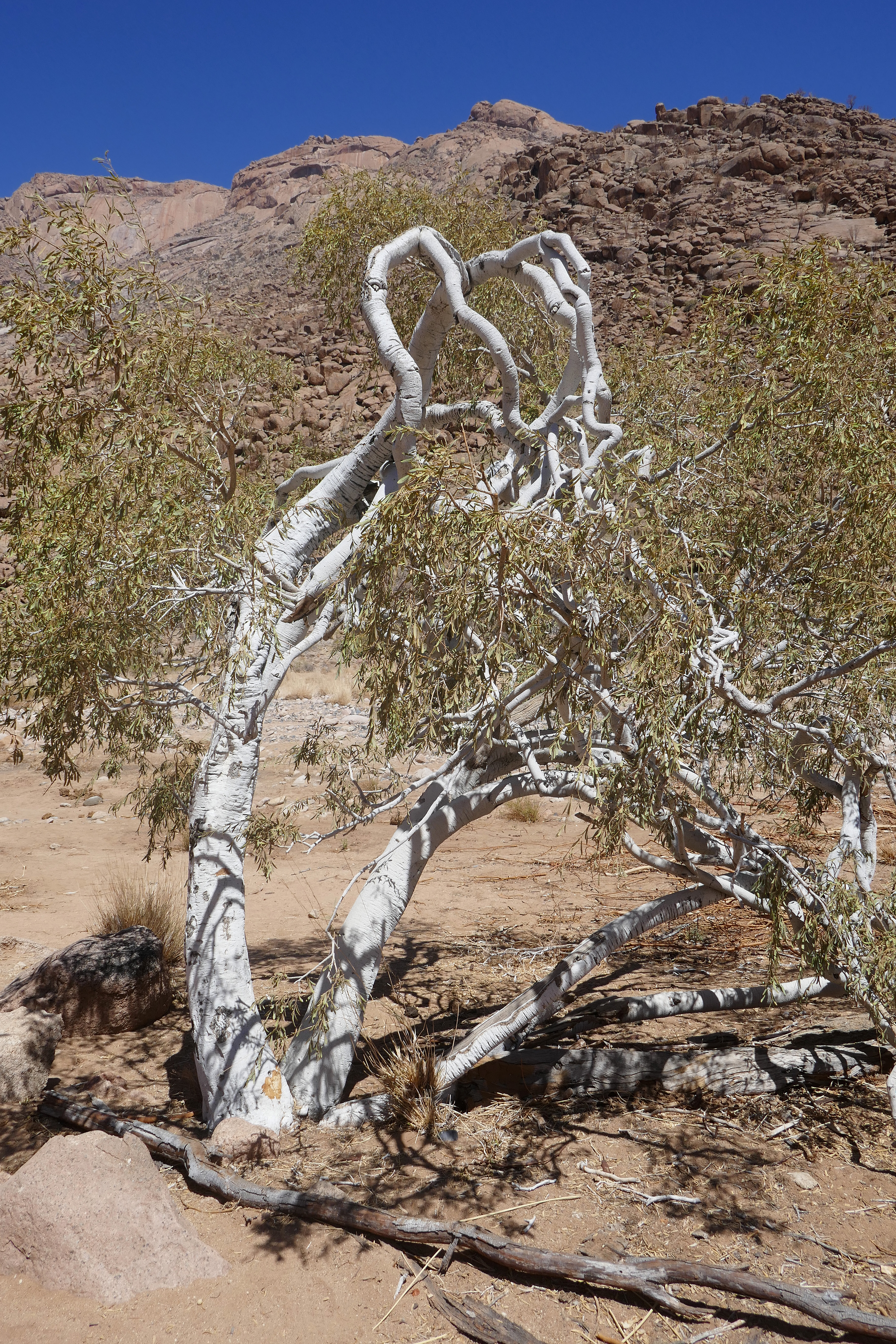 Boscia albitrunca dans le massif du Brandberg en Namibie.